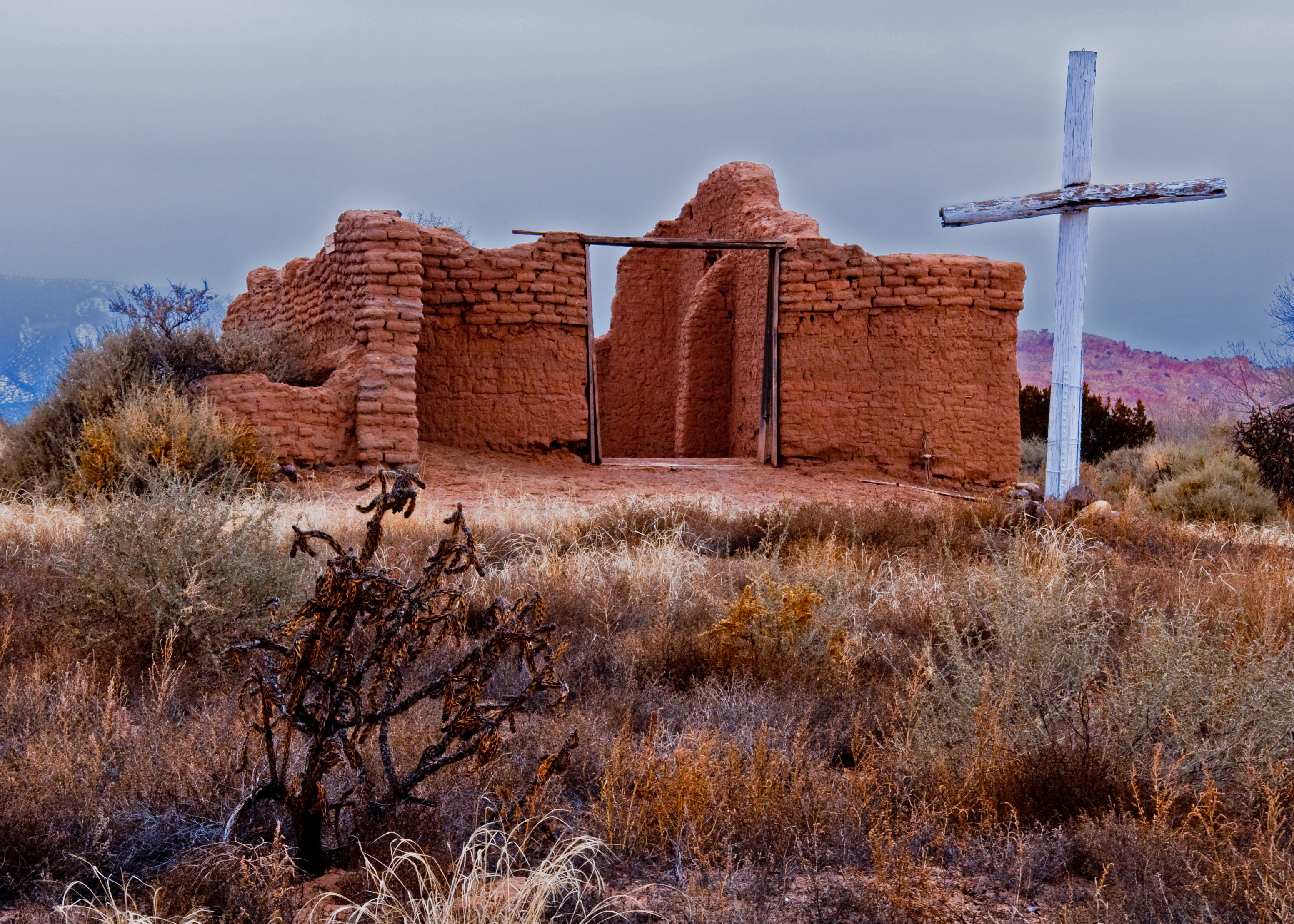 Santa Rosa de Lima de Abiquiu ruins, Hwy 84 South of Abiquiu